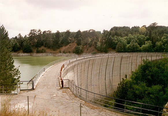 La diga di Cecìta vista dal lato destro